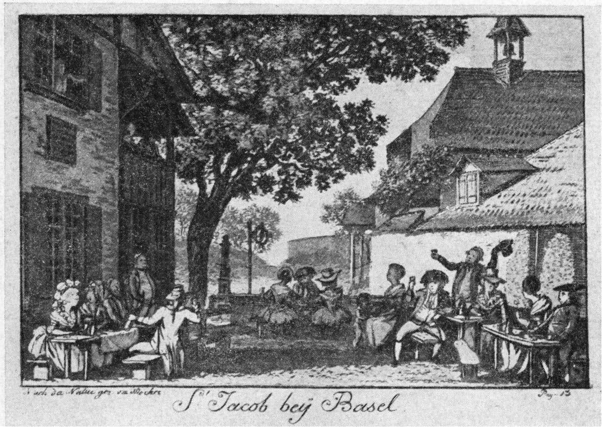 St. Jakob an der Birs bei Basel, Wirtshausszene. Kupferstich in getuschter Manier. -- St. Jakob an der Birs near Basel, Pub scene. Inked copper.